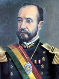 Ex presidente Jose manuel pando